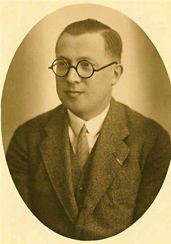 Jiří Sedmík (1893 - 1942), Český legionář, politik a diplomat.